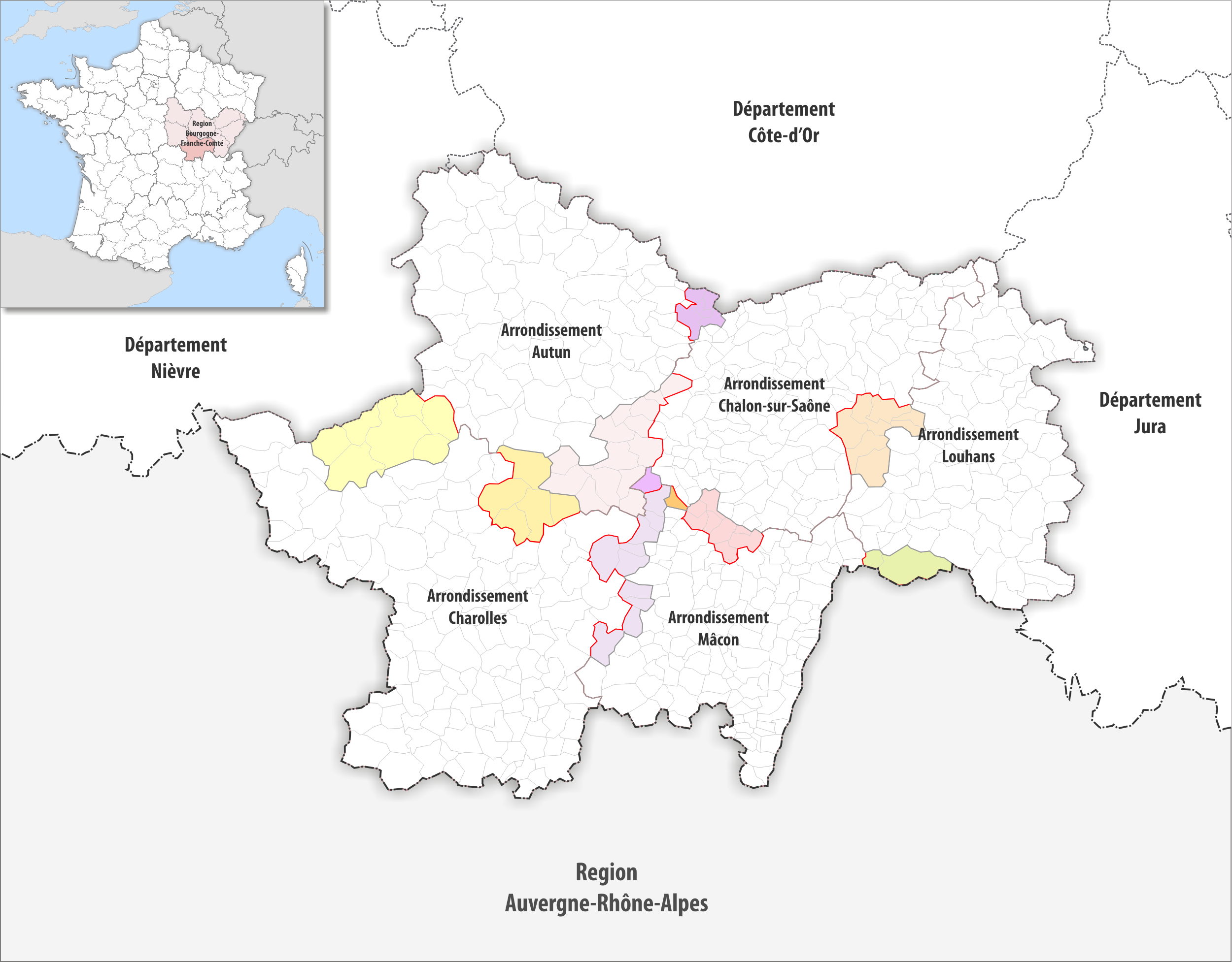 Arrondissements Anpassungen auf 2017 im Departement Saône-et-Loire